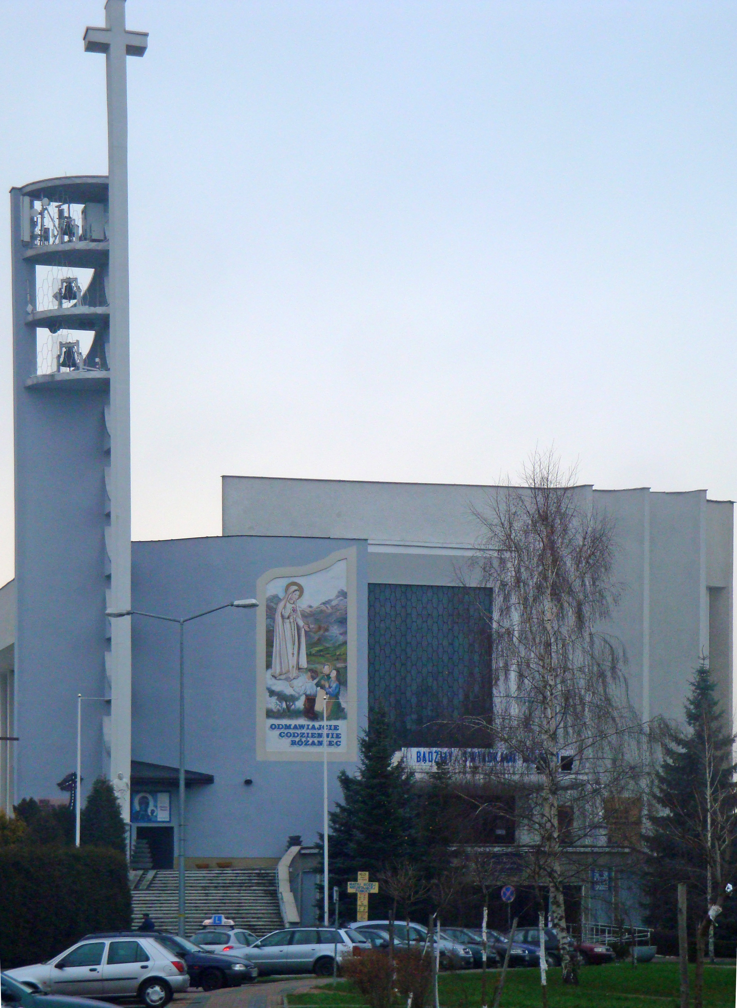 Kościół Matki Bożej Nieustającej Pomocy w Tarnobrzegu-Serbinowie